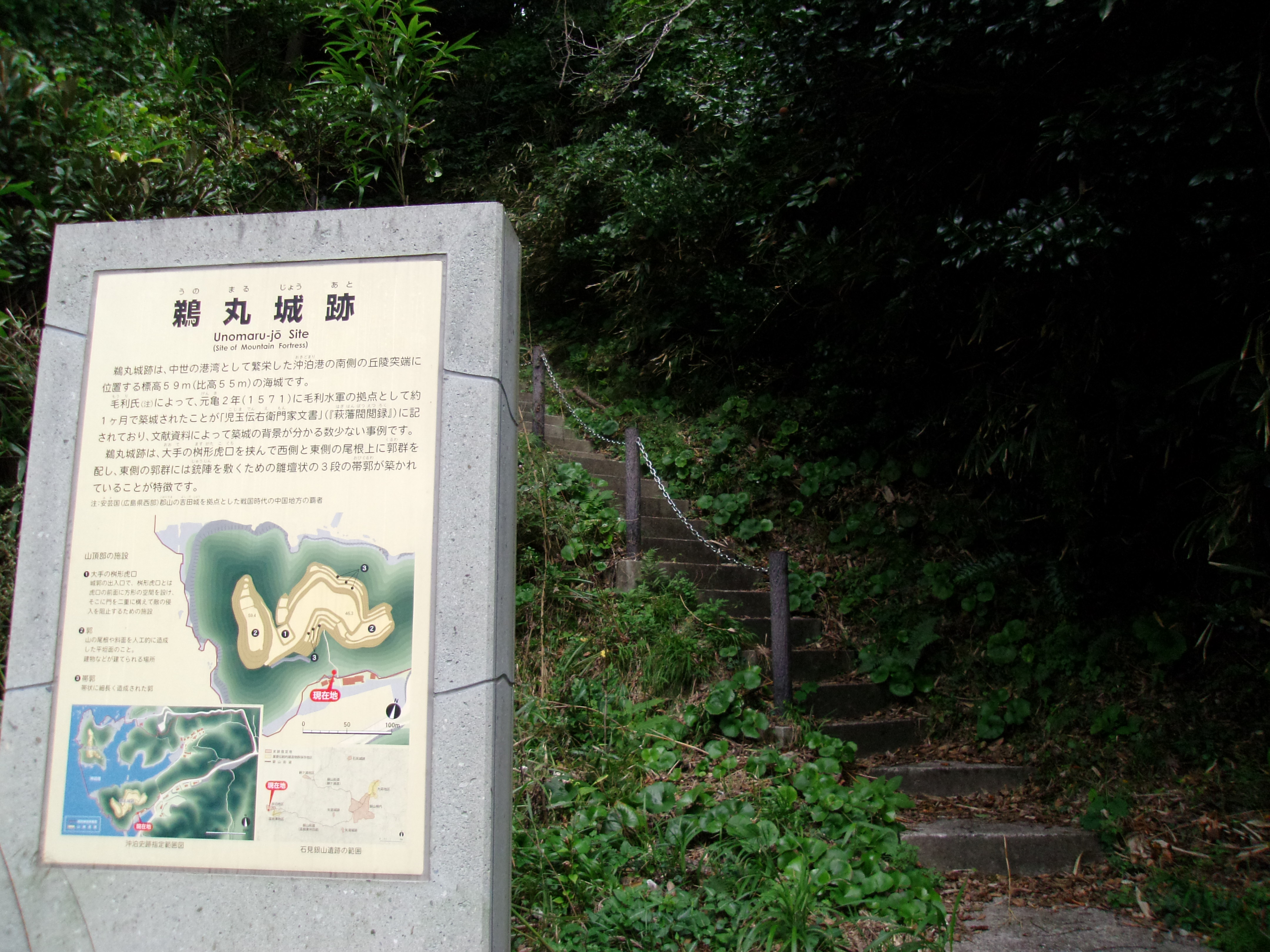 世界遺産「石見銀山」の構成資産である沖泊 鵜丸城跡